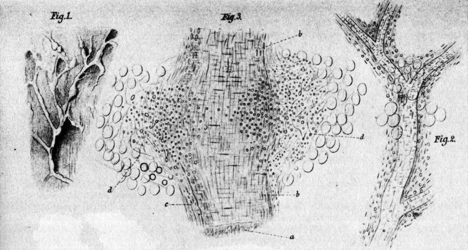 Polyarteriitis nodosa: Mikroskopische Befunde mit knotig verdicktem und verästeltem Arterienzweig aus Dünndarmsubmukosa in natürlicher Größe (Fig. 1). Arterienstämmchen aus dem M. flexor digitorum sublimis mit beginnender diffuser Kernwucherung (x155; Fig. 2). Knotig verdicktes und aneurysmatisch erweitertes Arterienstämmchen: (a) Tunica intima, (b) Tunica media, (c) Tunica adventitia, (d) neugebildetes Binde- und Fettgewebe (Fig. 3; x155)